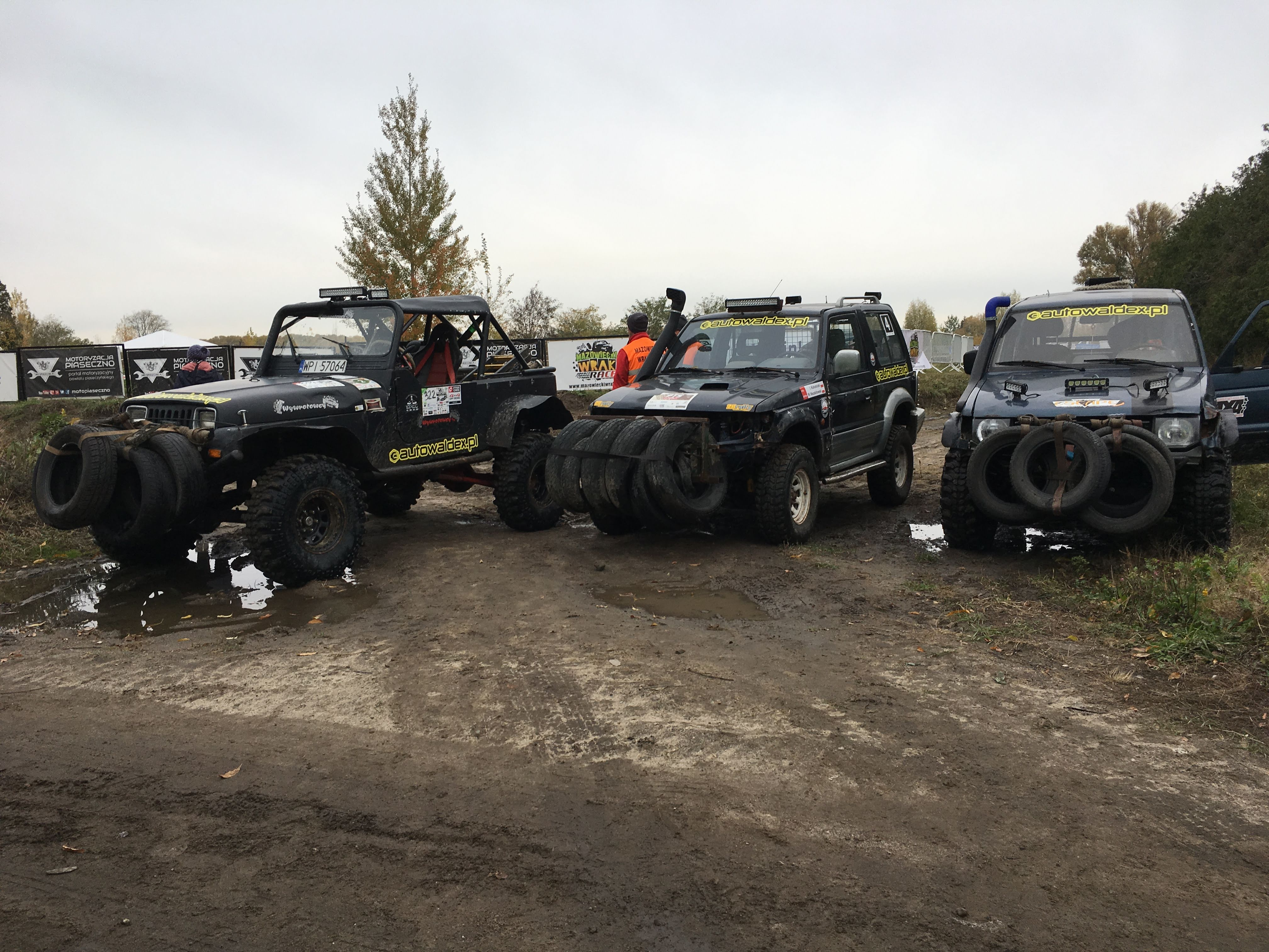 Spychacze wykorzystywane podczas Wrak Race